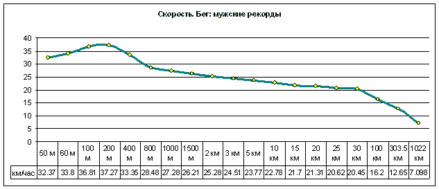 Подборка из книги рекордов Гинесса спортивных достижений, диаграмма показывает скорость.